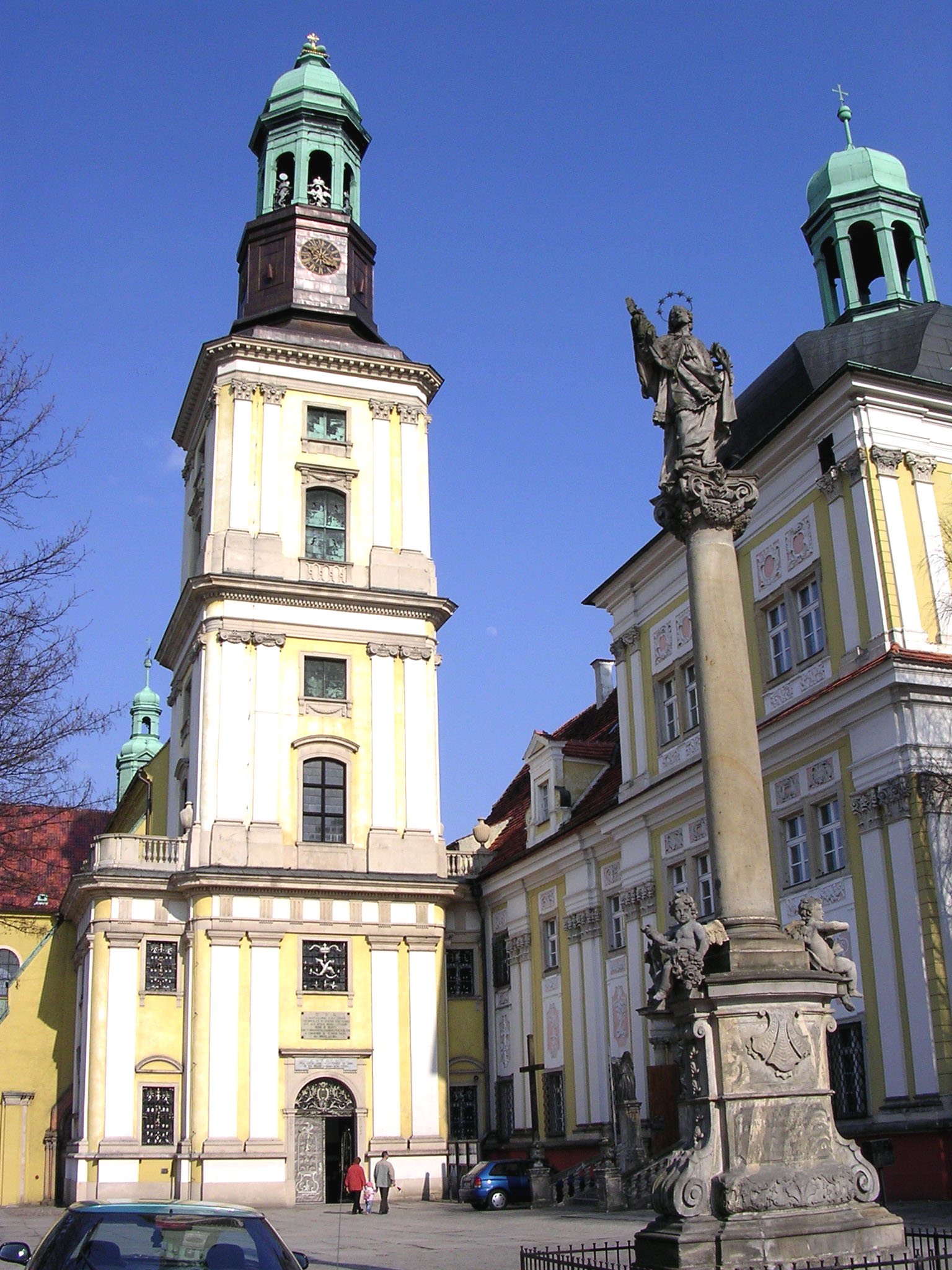 Trzebnica, kościół, ob. par. p.w. śś. Bartłomieja i Jadwigi, 2 poł. XIII